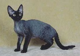 devon rex black